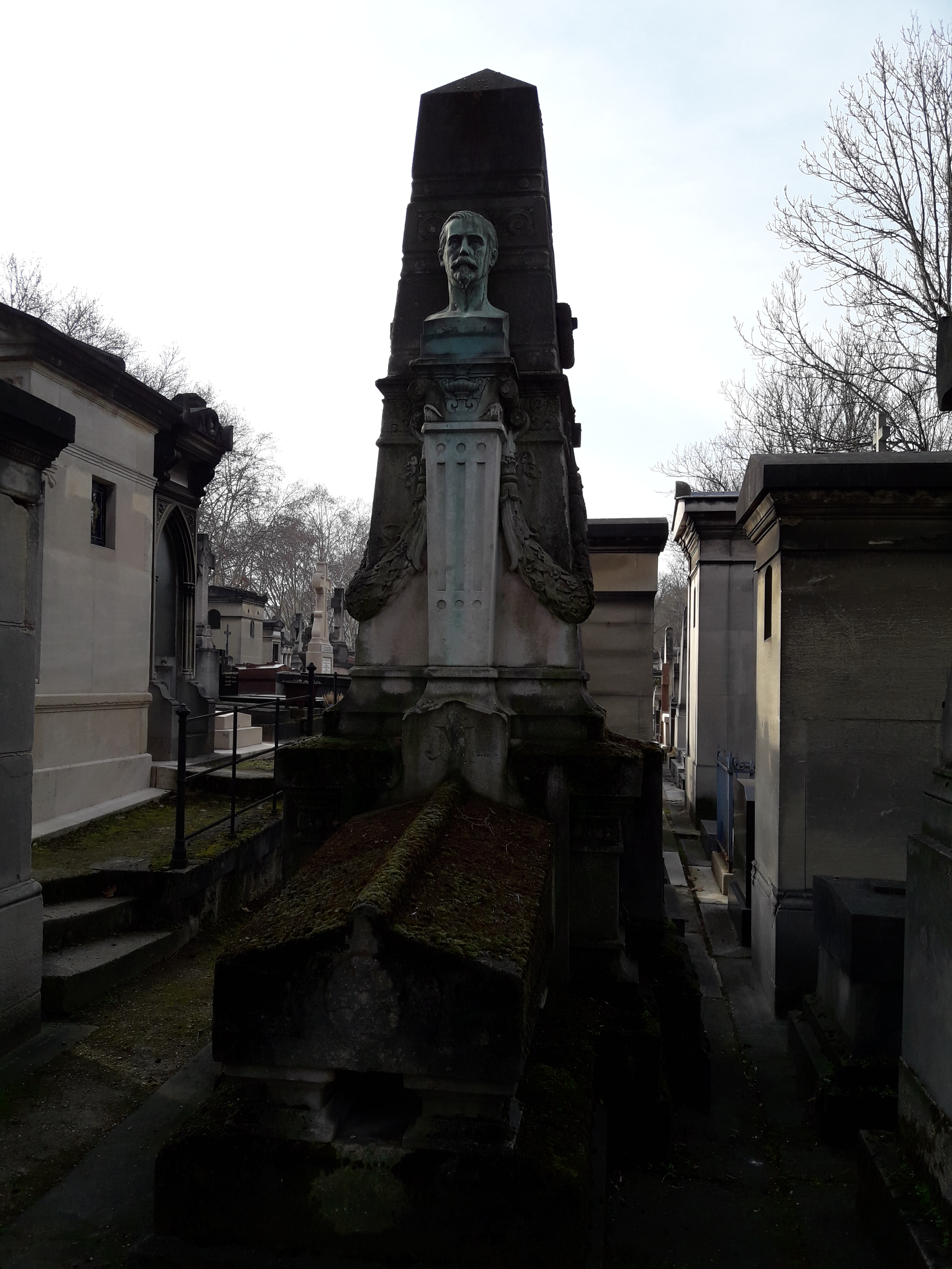 Monument funéraire de Jules Moulin, consul de France à Salonique, assassiné lors d'une émeute, le 6 mai 1876, à l'âge de 39 ans. Tombeau avec pyramide quadrangulaire tronquée, situé dans la 17e division du cimetière du Montparnasse. Le buste en bronze, de 45 cm de haut, est signé F. Bogino, 1877 et A. Charnod, fondeur. Inscriptions relevées : "A la mémoire de Jules Moulin, consul de France à Salonique, mort le 6 mai 1876 à l'âge de 39 ans. Il est mort en faisant son devoir" (face latérale droite). "He is not dead but only lieth sleeping, in the sweet refuge of his master's breast, and far away from sorrow, toil and weeping, he is not dead but only taking rest" (face arrière).